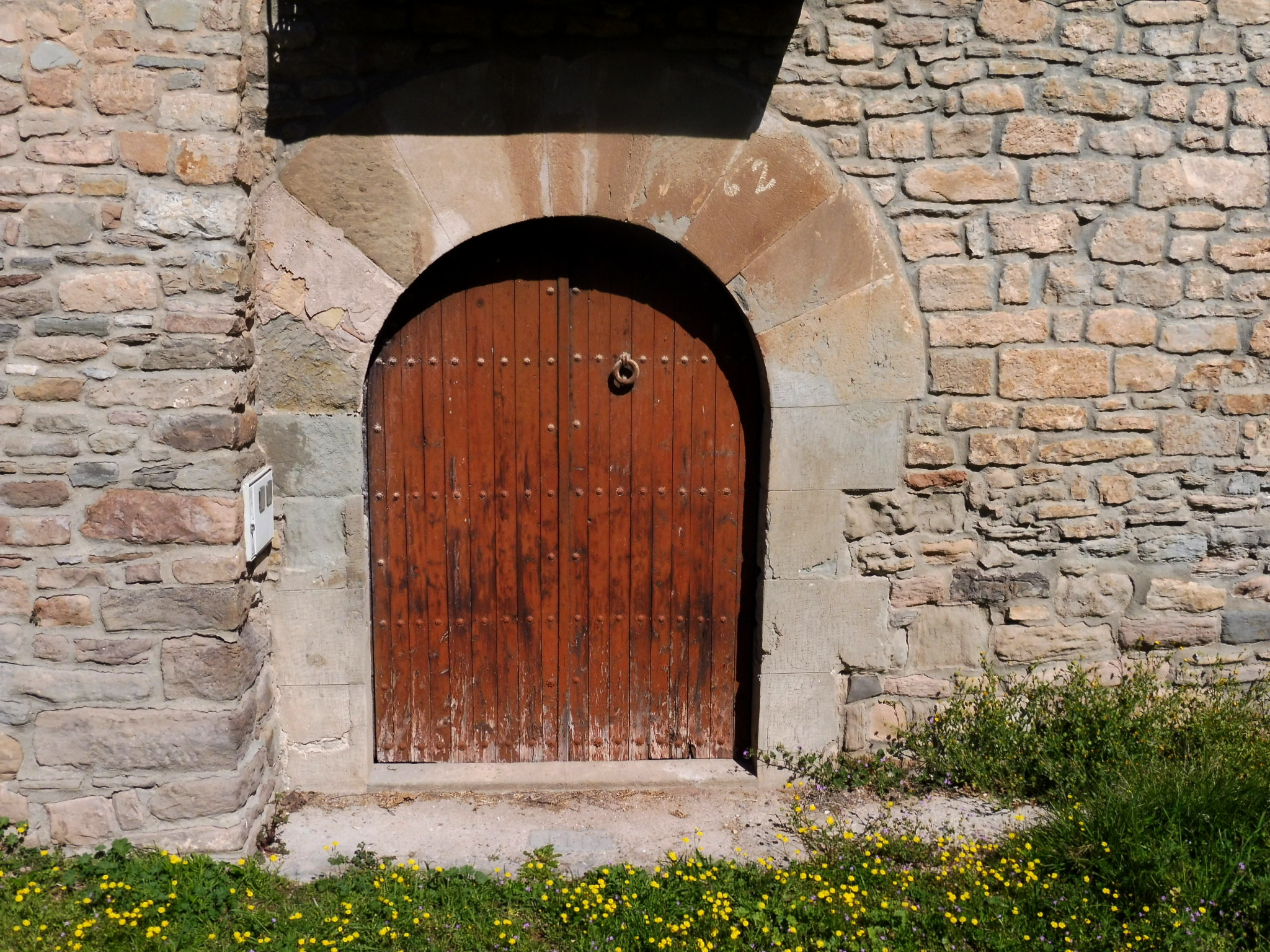 Cal Palà (Aguilar de Segarra): portal